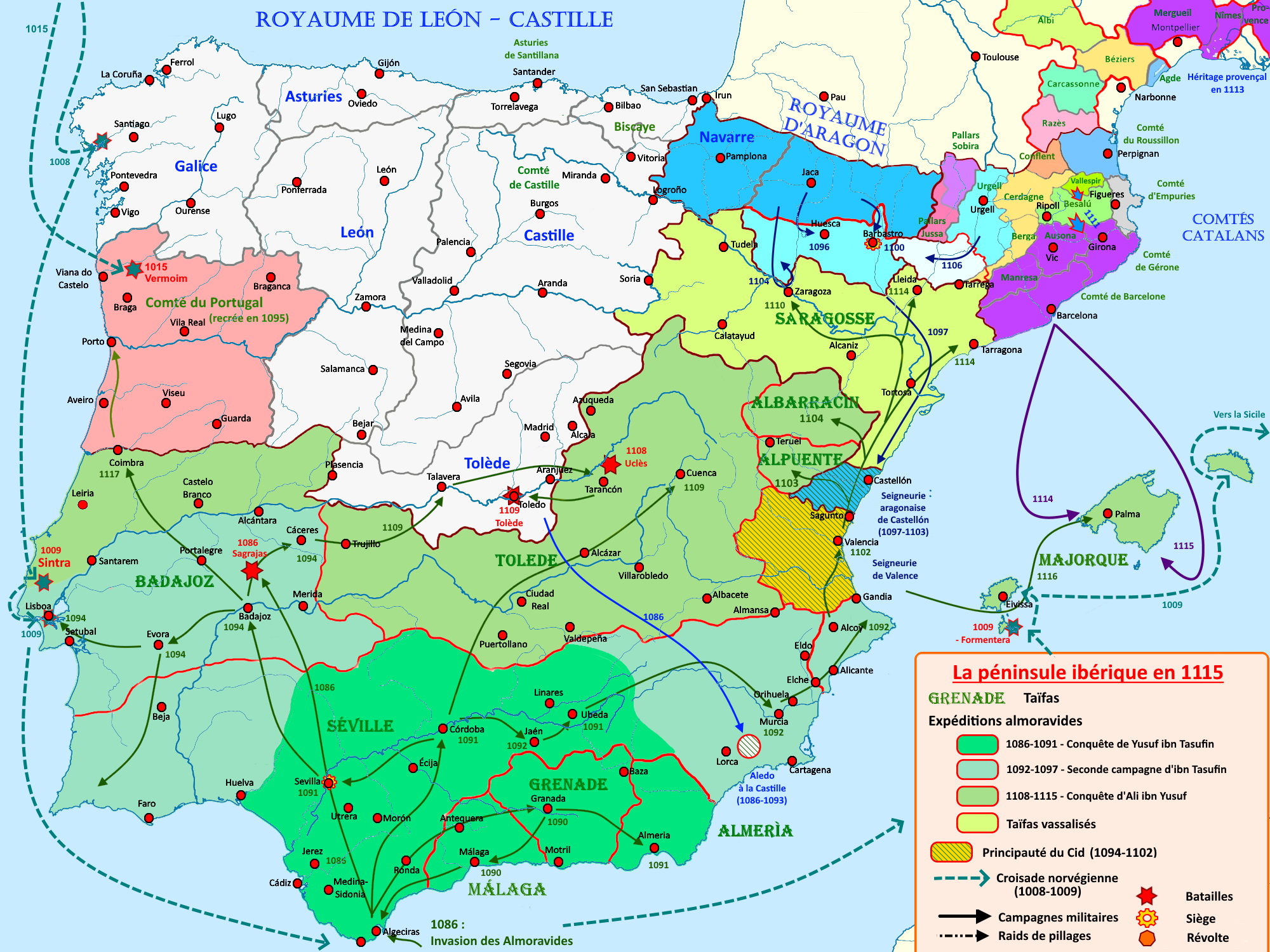 Carte de la Péninsule ibérique en 1115 illustrant les principaux évènements de l'époque